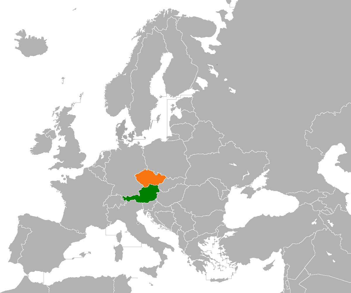 Austria-Czech Republic locator map.